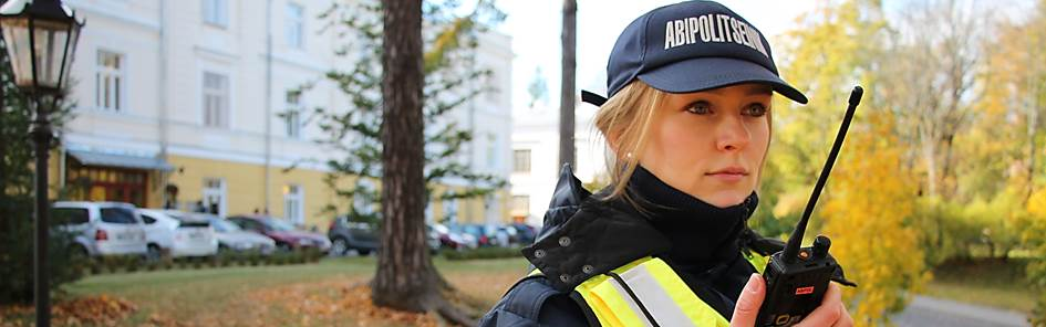 Lõuna prefektuur